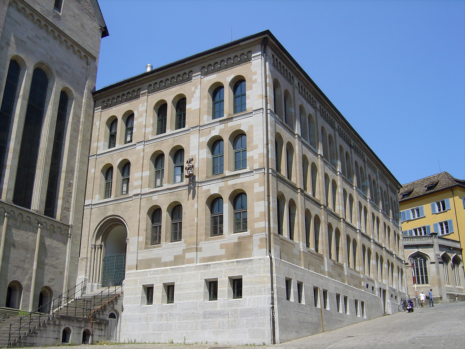 Das theologische Seminar der Universität Zürich, früher Schulhaus Grossmünster der Höheren Töchterschule der Stadt Zürich